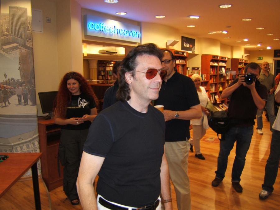 Steve Hackett w warszawskim Empiku - 2006-09-07